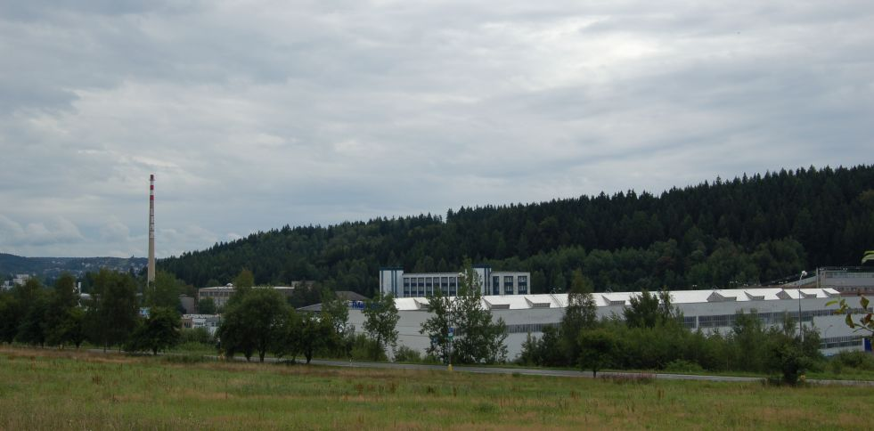 Průmyslová zóna Rýnovice, Jablonec nad Nisou.